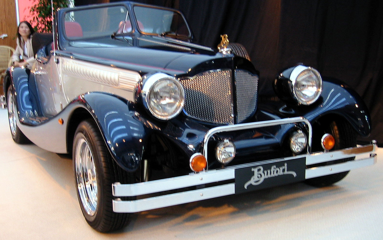 Bufori MKII at IAA 2003